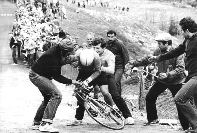 Friedensfahrt, Fahrerfeld, Sturz ADN-ZB Kasper 11.5.86 VRP: 39. Internationale Friedensfahrt-5.Etappe: Kntno-Pesnan (196 km)-Die DDR-Mannschaft hielt sich stets geschlossen im vorderen Feld auf. vlnr: Dan Radtke (halb verdeckt), Uwe Ampler (61), Uwe Raab (65) und Mannschaftskapitän Thomas Barth (62).